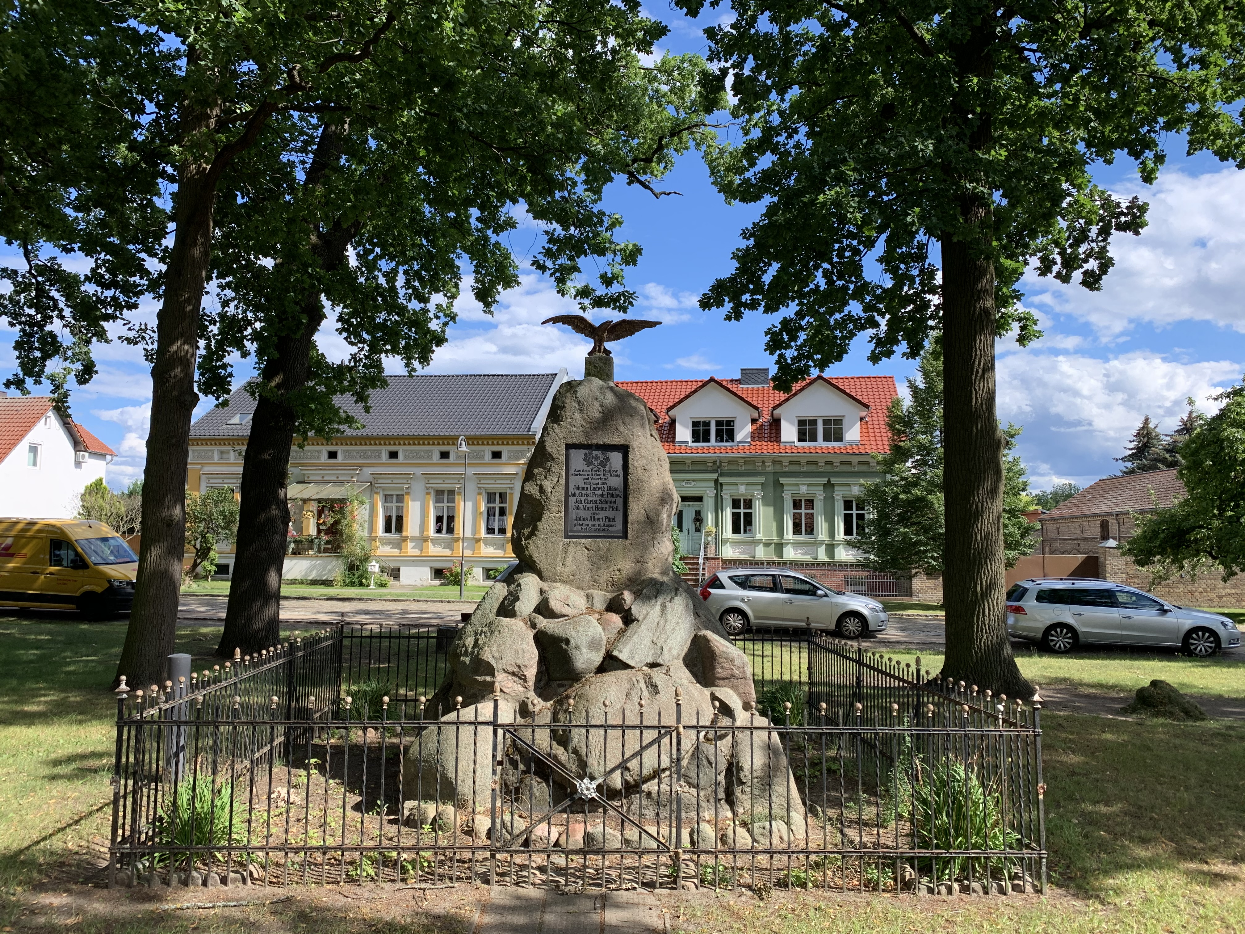 Ragow, ein Ortsteil der Stadt Mittenwalde in Brandenburg